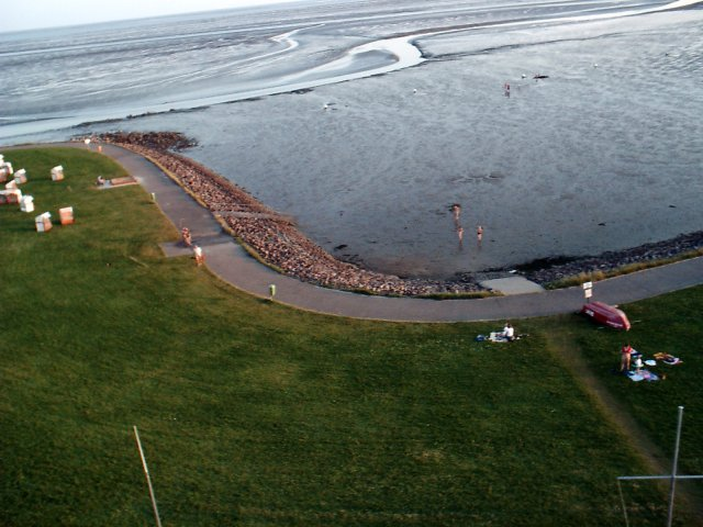 Badestelle von Vollerwiek.